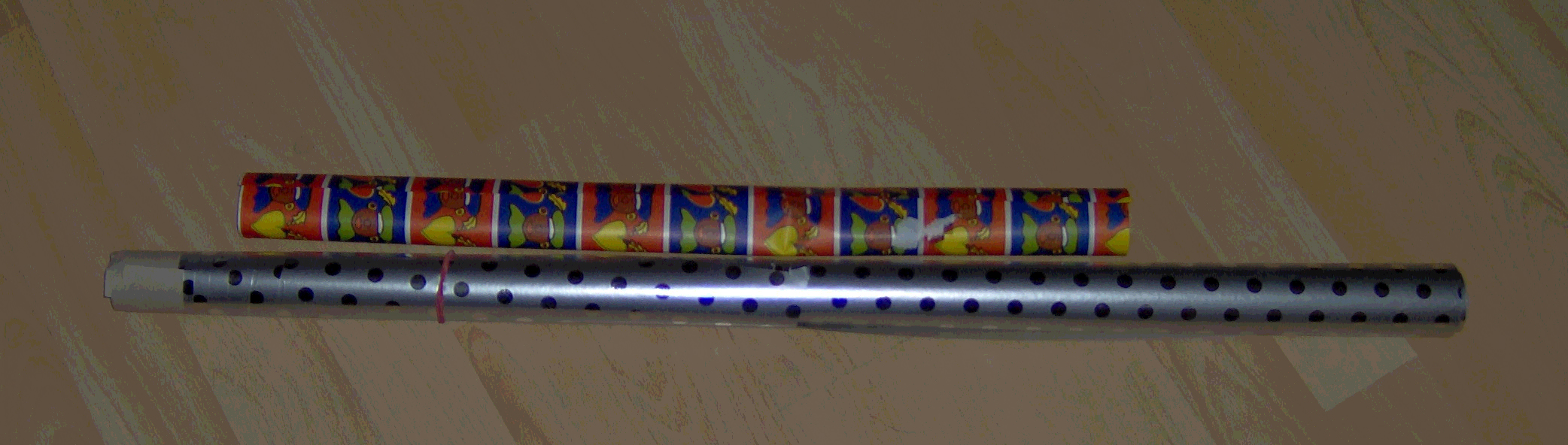 Inpakpapier, zowel Sinterklaas als gewoon. Zelfgemaakte foto